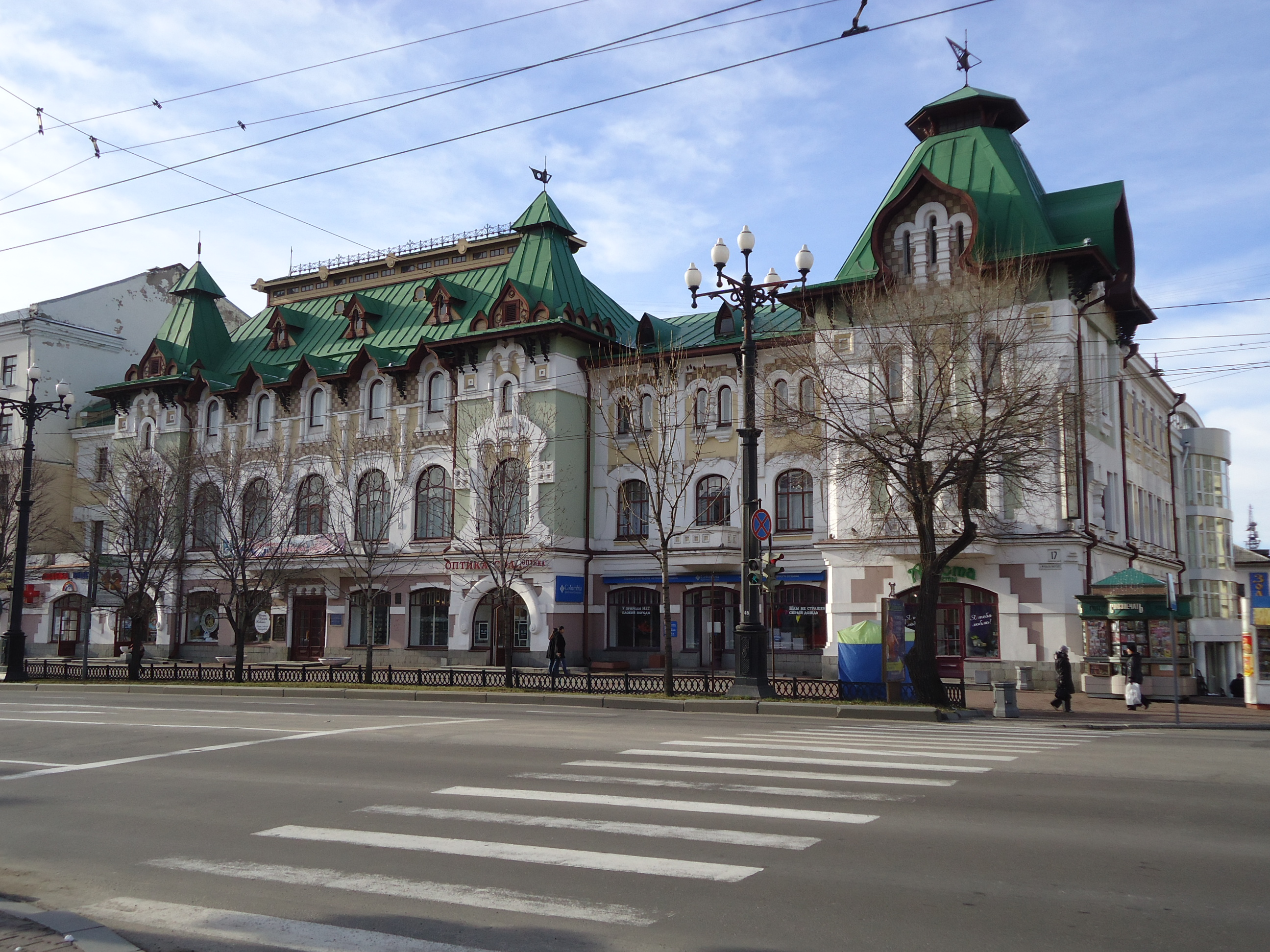 Городской дом (Хабаровский край, Хабаровск, Муравьева-Амурского улица (улица Карла Маркса), 17)